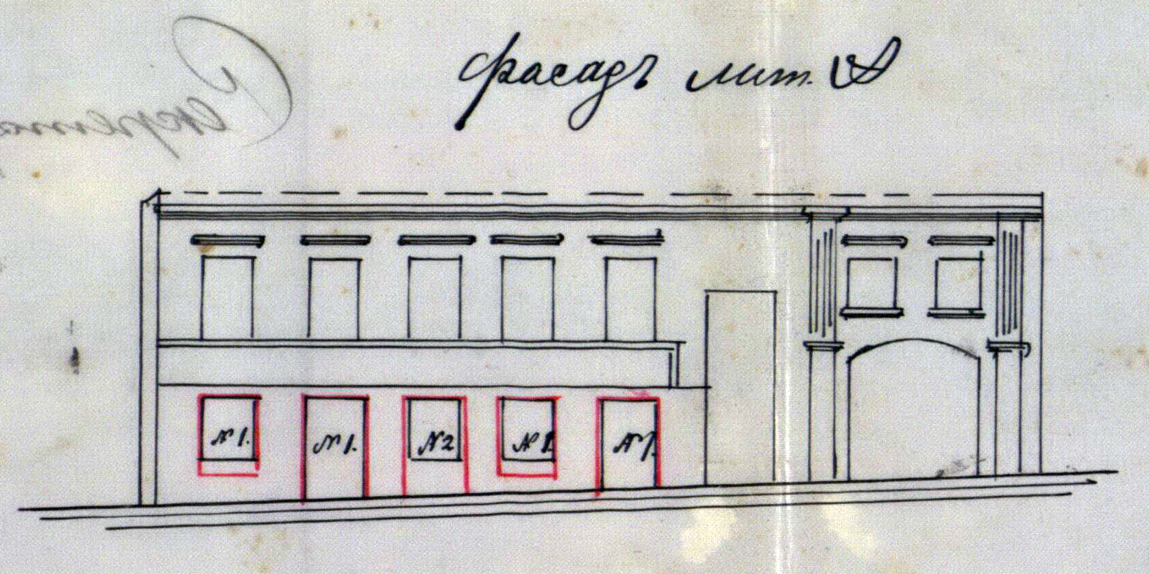 Беларуская (тарашкевіца): Менск (Miensk), вуліца Койданаўская (vulica Kojdanaŭskaja). Дом Гурвіча (Hurvič)